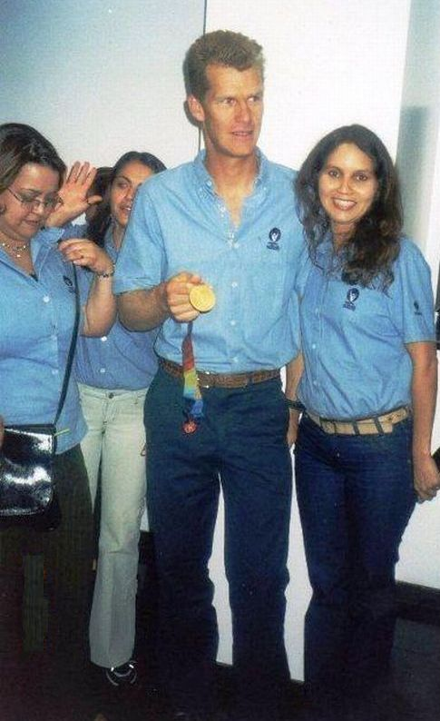 O iatista brasileiro Robert Scheidt, campeão olímpico, em evento esportivo na Sociedade Amigos da Praia do Cassino, Rio Grande, RS. Autor da foto original: Mário Antunes Teixeira ,trabalho derivado com permissão do autor por luferom